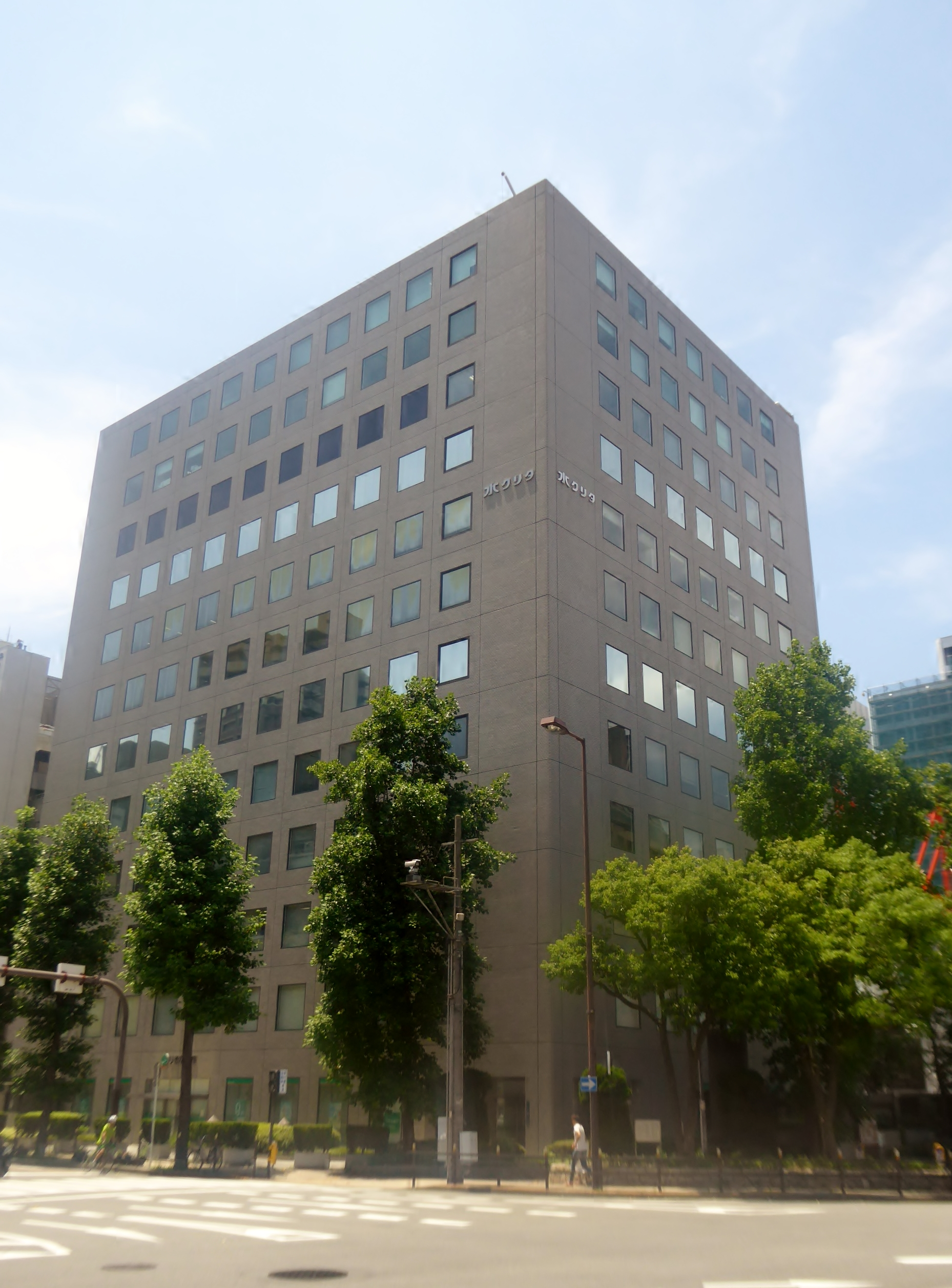 北浜中央ビルを撮影。